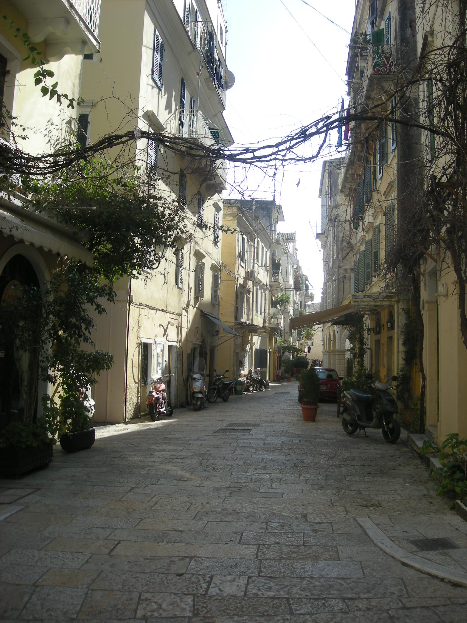 Οδός Γκίλφορδ, σε τιμή του Κόμη Φρεδερείκου Νορθ, στην Κέρκυρα